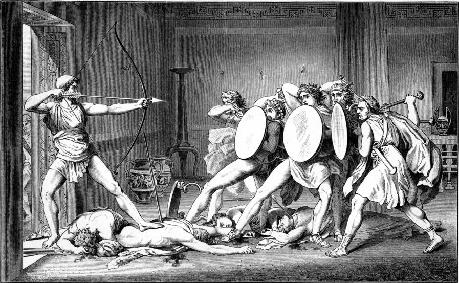 Illustration from Schwab, Gustav: “Die schönsten Sagen des klassischen Altertums” (1882)